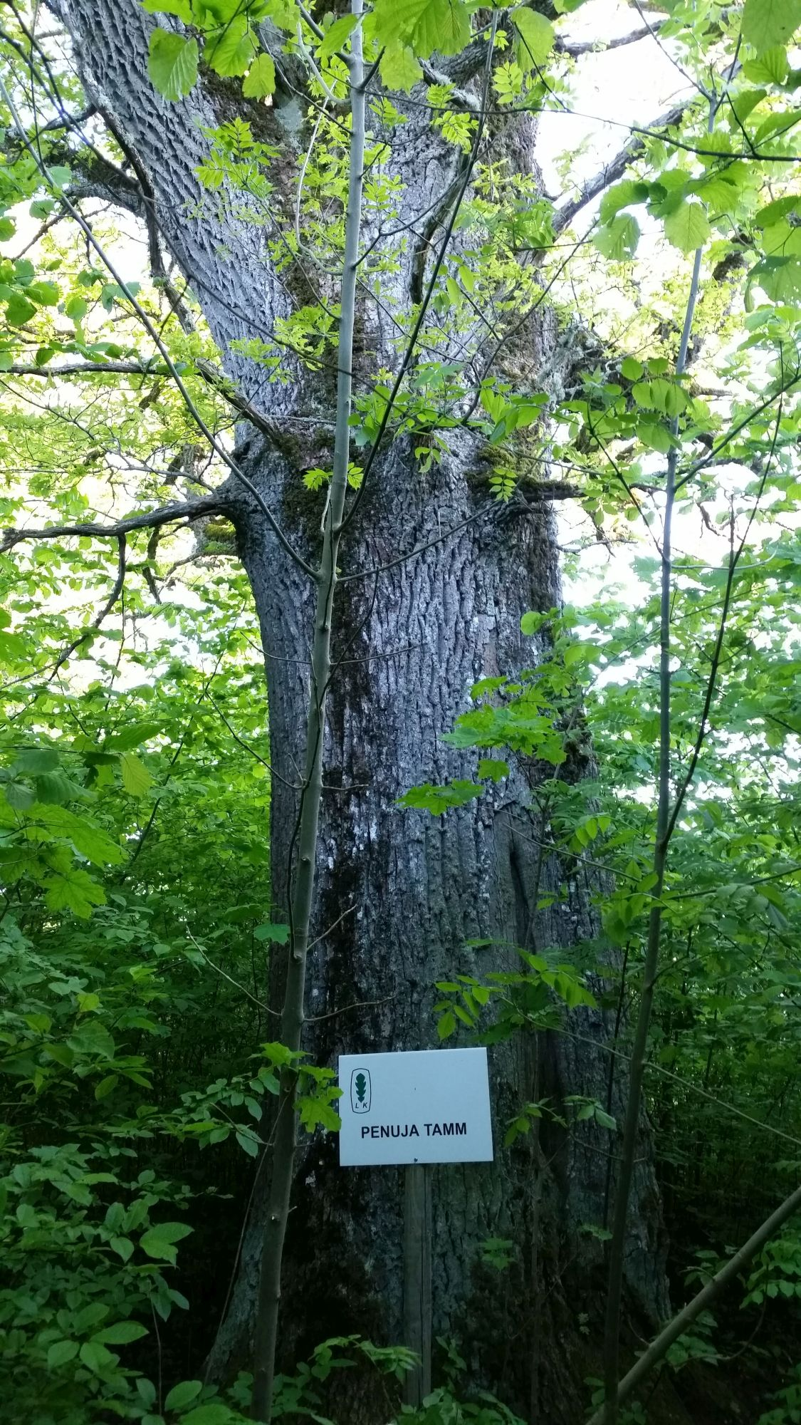 Penuja tamm